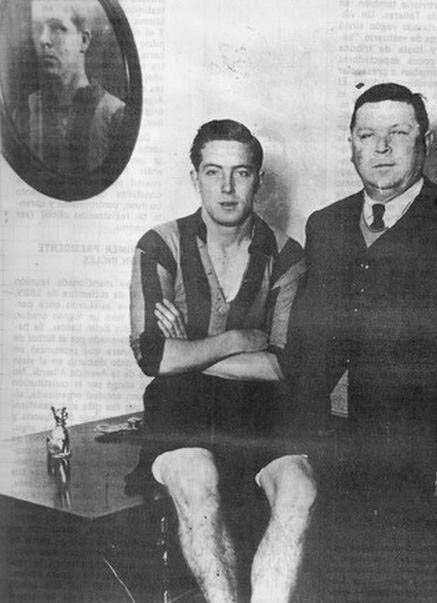 Harry Hayes (son) and Harry Hayes (his father), both players of Rosario Central.